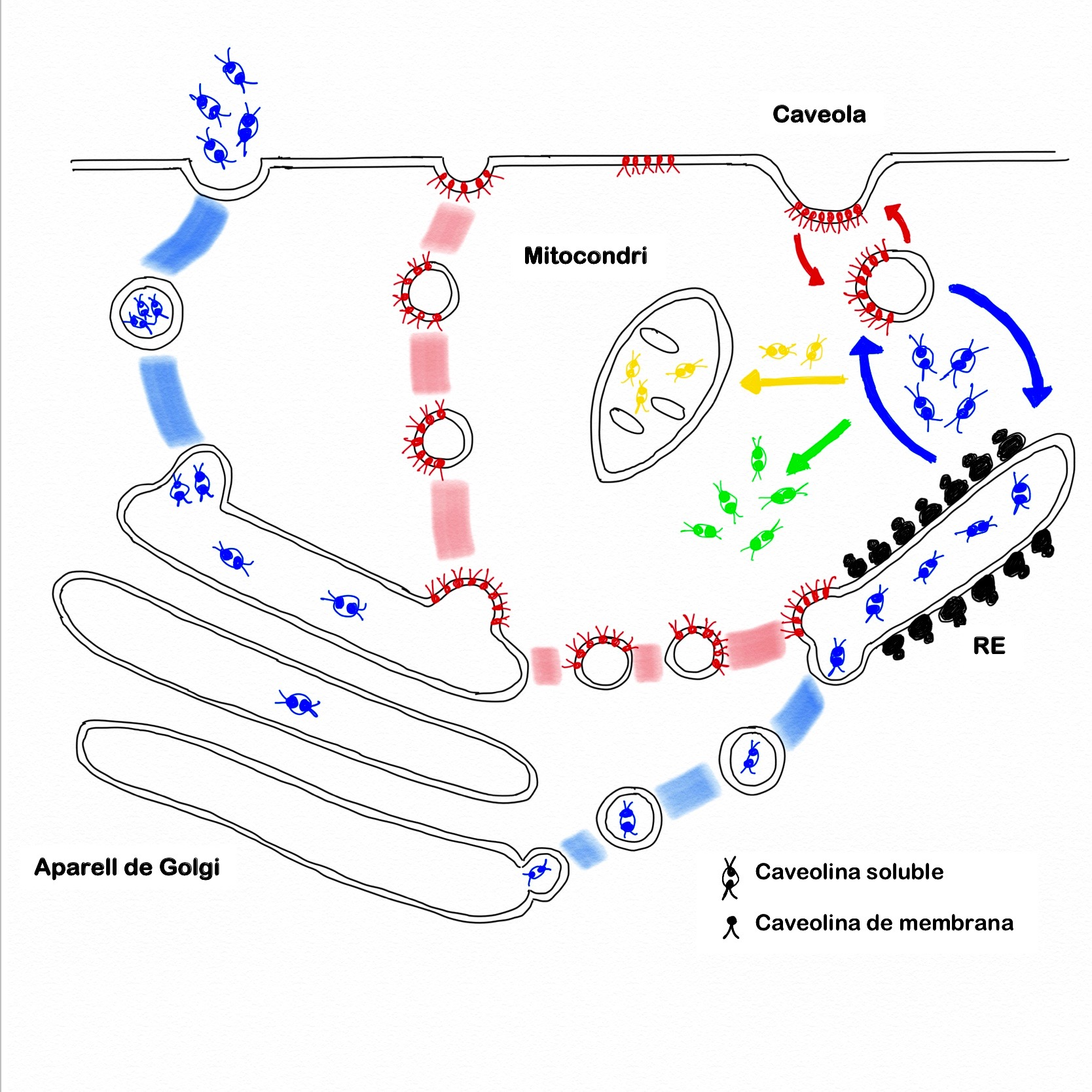 Es tracta d'una adaptació de la imatge publicada en l'article "Multiple Functions of Caveolin-1", en la qual mostra l'itinerari que fa la Caveolina-1 dins a la cèl·lula